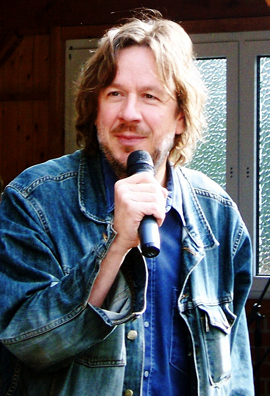 Jörg Kachelmann im Oktober 2008